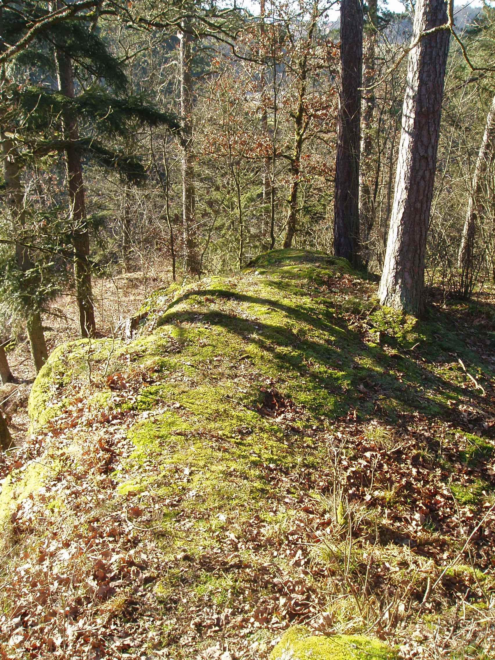 Burgfelsen Neuaist